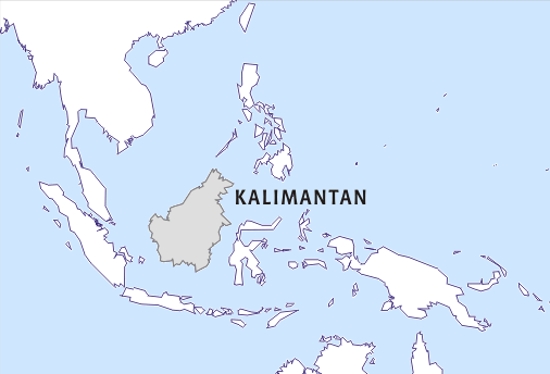 Kalimantani asendikaart